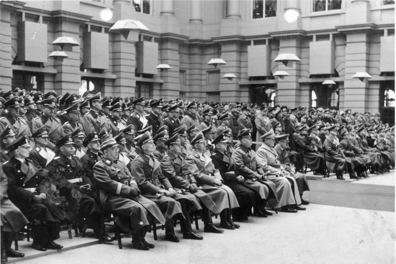 Deutschland gedenkt seiner gefallenen Söhne. Der Führer beim Staatsakt in Berlin Ganz Deutschland gedachte am Heldengedenktag 1943, am Sonntag, 21.3.1943, seiner auf dem Felde der Ehre gefallenen Helden. Im Berliner Zeughaus fand aus diesem Anlaß eine Staatsakt statt, an dem auch der Führer teilnahm. Blick in das Zeughaus während des Staatsaktes. Neben dem Führer sitzend Reichsmarschall Göring, Generalfeldmarschall Keitel, Großadmiral Dönitz, Reichsführer SS und Chef der deutschen Polizei, H. Himmler, Generalfeldmarschall Milch, Generalfeldmarschall Bock und Reichskriegsopferführer Oberlindober. Atlanic-Boesig, 21.3.1943